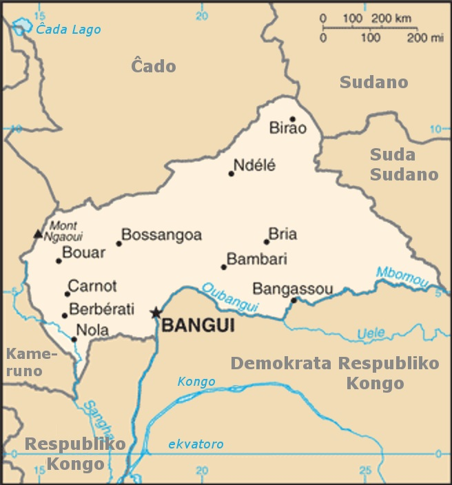 Esperantigita versio de Dosiero: Central african republic sm04.png Prilaborita de Punktor 17:57, 27. Jul 2008 (UTC)